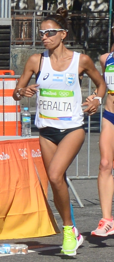 Passage du marathon des jeux olympiques de Rio 2016 dans le centre de Rio